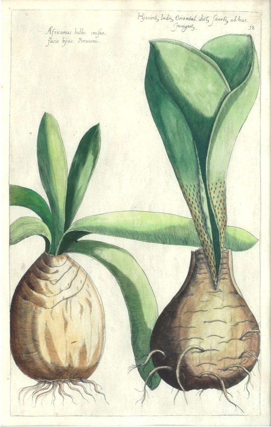 Plate from "Florilegium Amplissimum et Selectissimum"